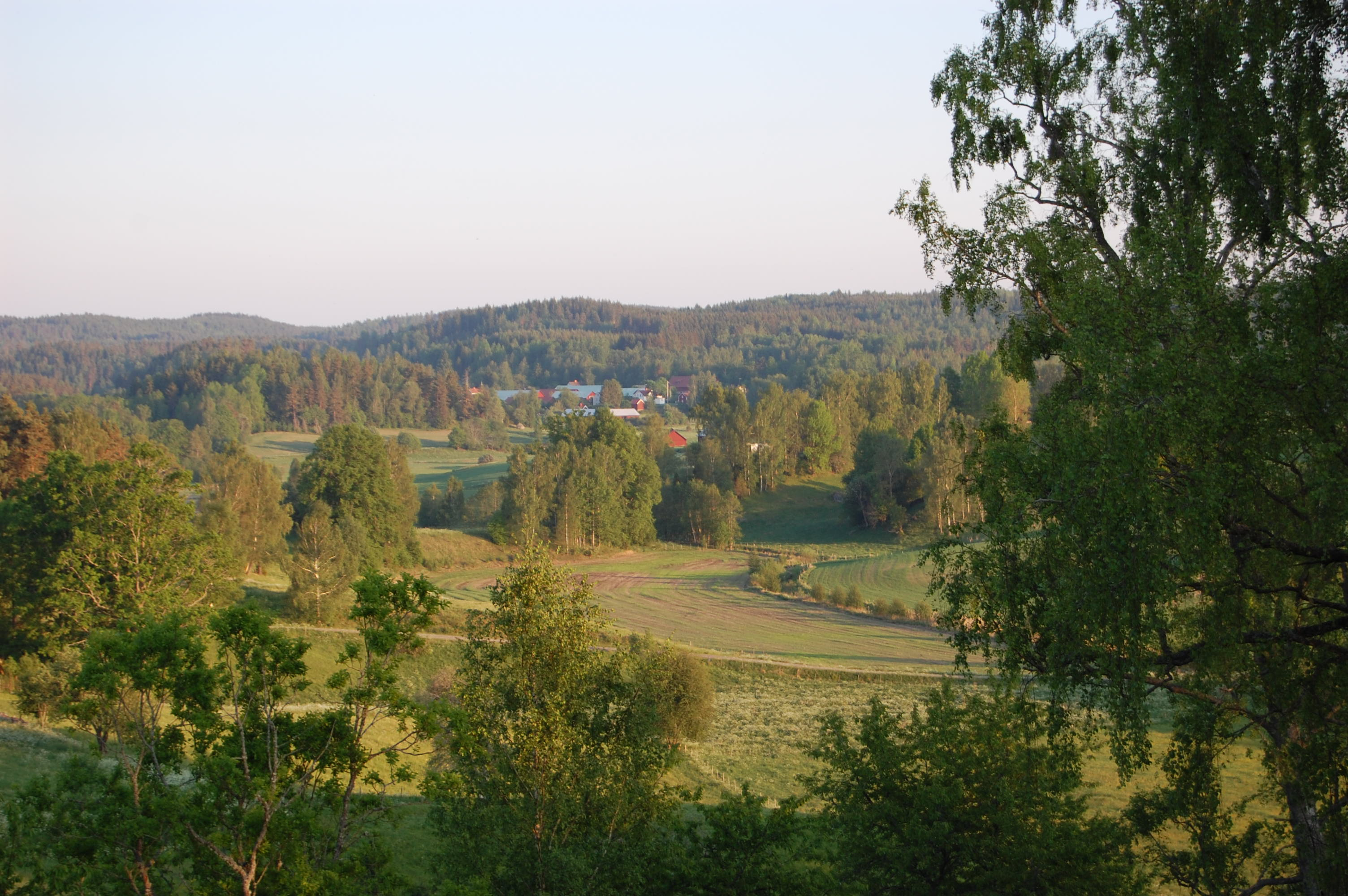 foto Sture Johansson